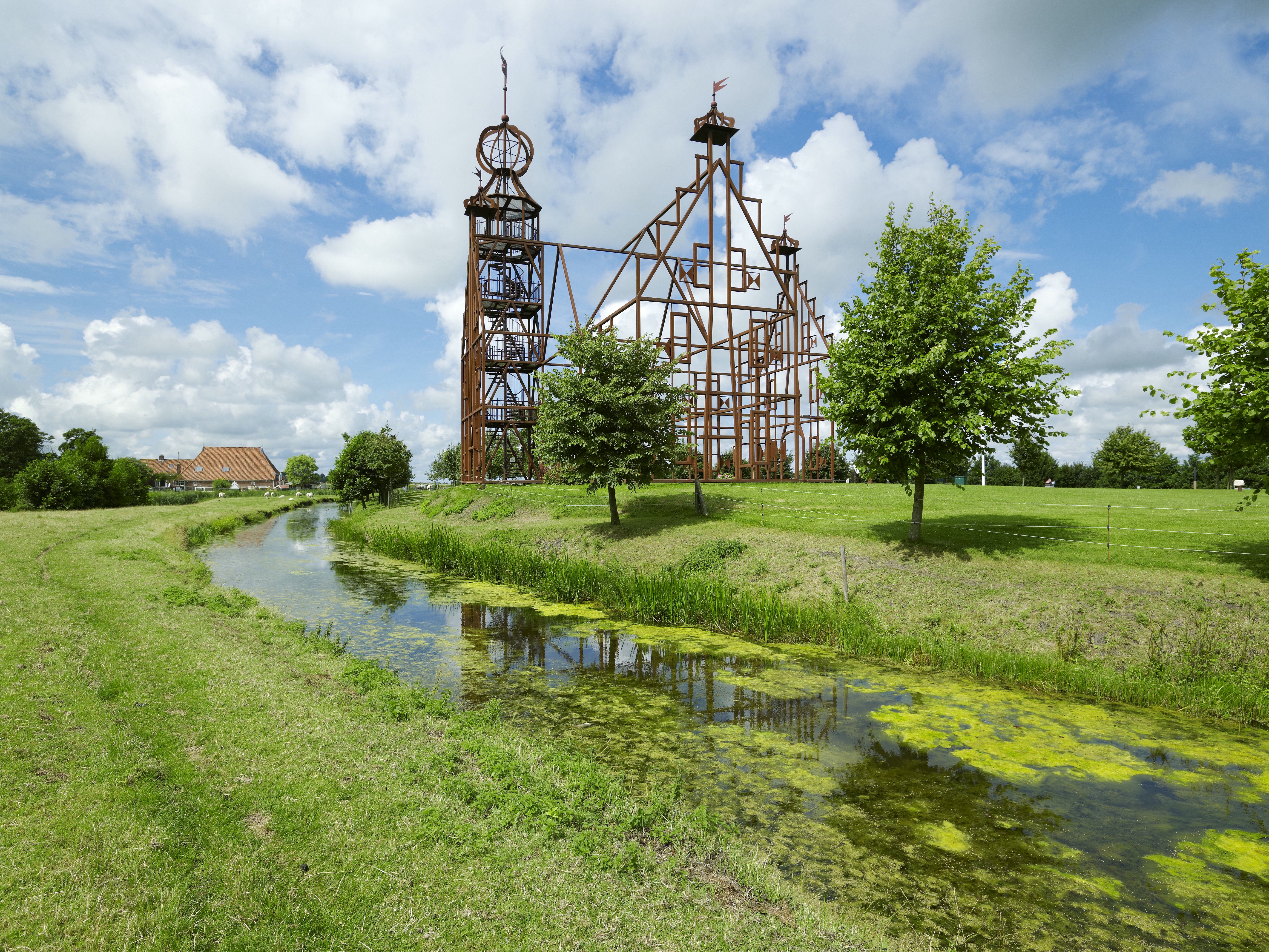 Uniastate: Overzicht van de stalen replica van de gesloopte state met omgrachting